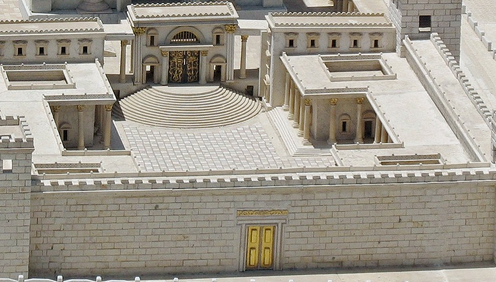 Detail Second Temple, Court of Women and Nikanor Gate